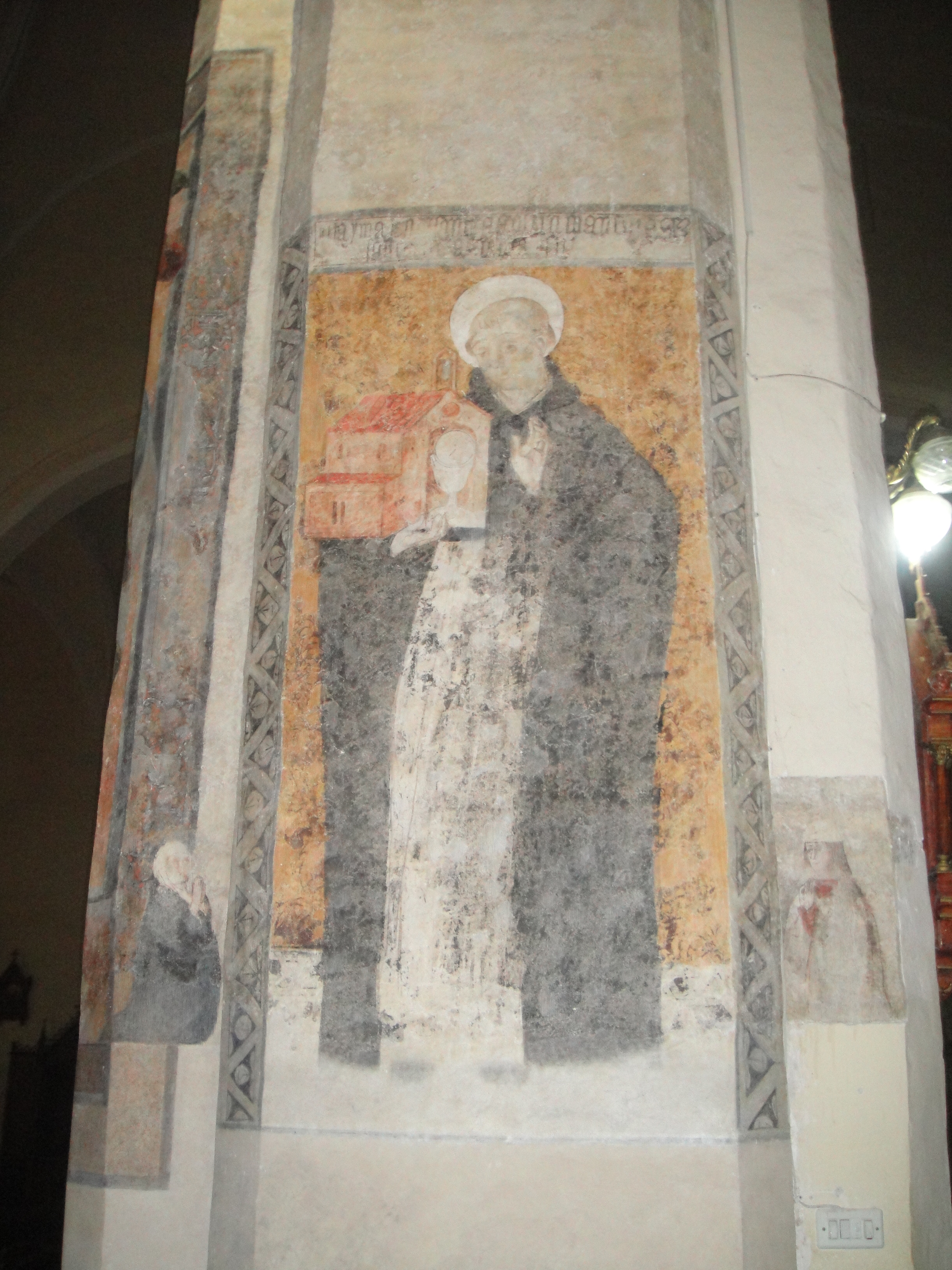 Pintura al fresco de finales del siglo XV que representa al célebre teólogo Santo Tomás de Aquino. Se encuentra en uno de los pilares de la iglesia de Nuestra Señora del Castillo de Fuente Obejuna, provincia de Córdoba, (España).